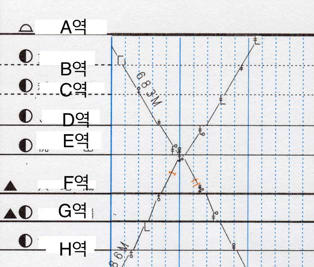 를 한국어로 번역한 것.